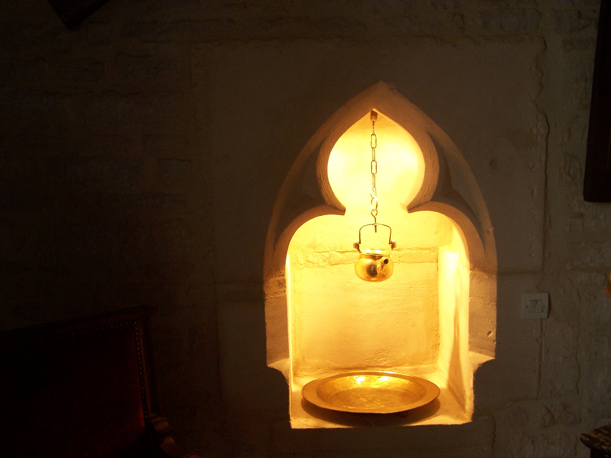 Lavabo du 13e 14e siècle du logis seigneurial d'Amblie (Calvados)